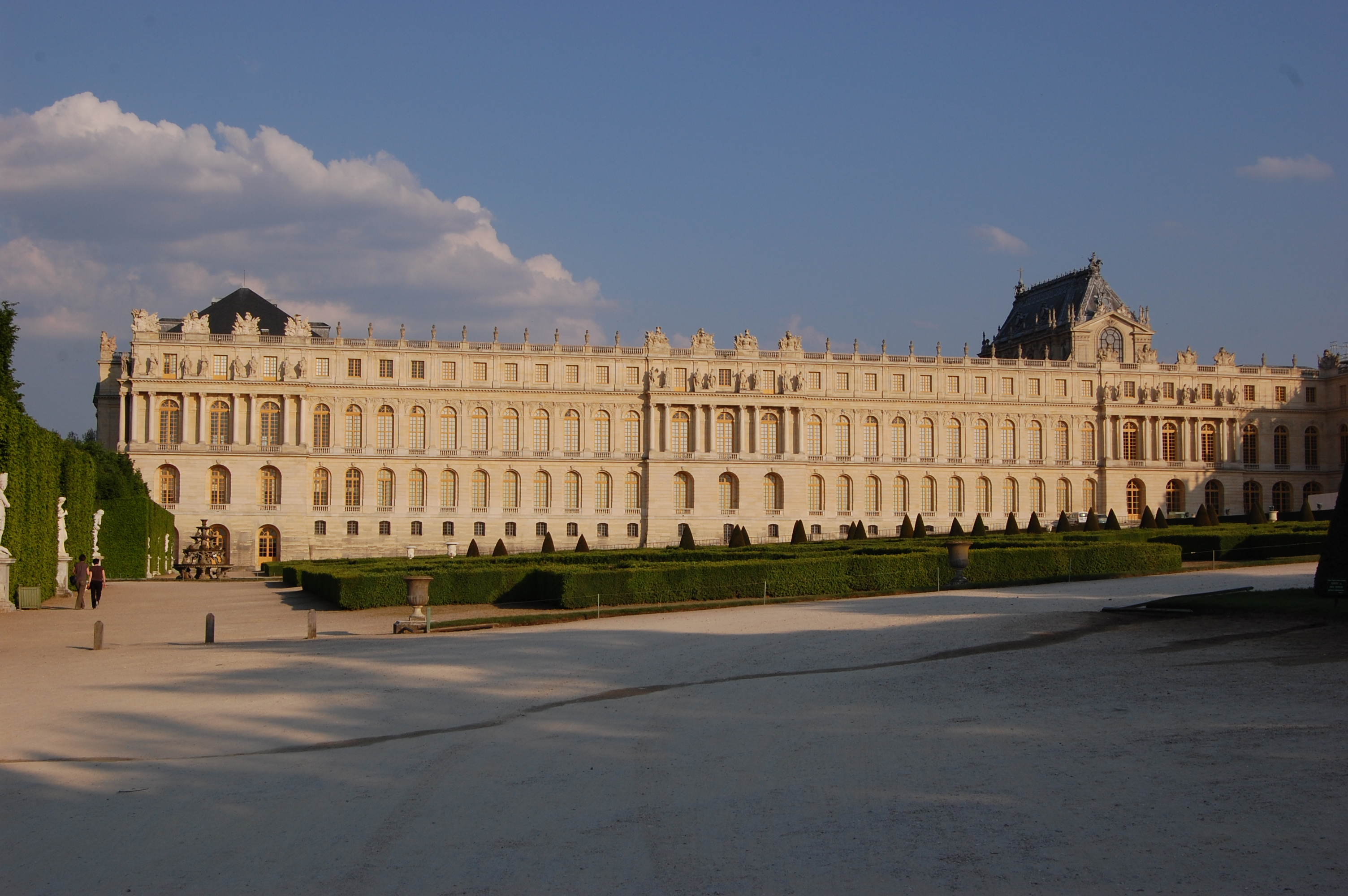 Aile du Nord du château de Versailles vue depuis le rond-point des philosophes